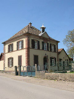 village de Vellescot (Territoire de Belfort) Photo prise en mai 2004 par LP90 Licence GFDL LP90 mai 2004